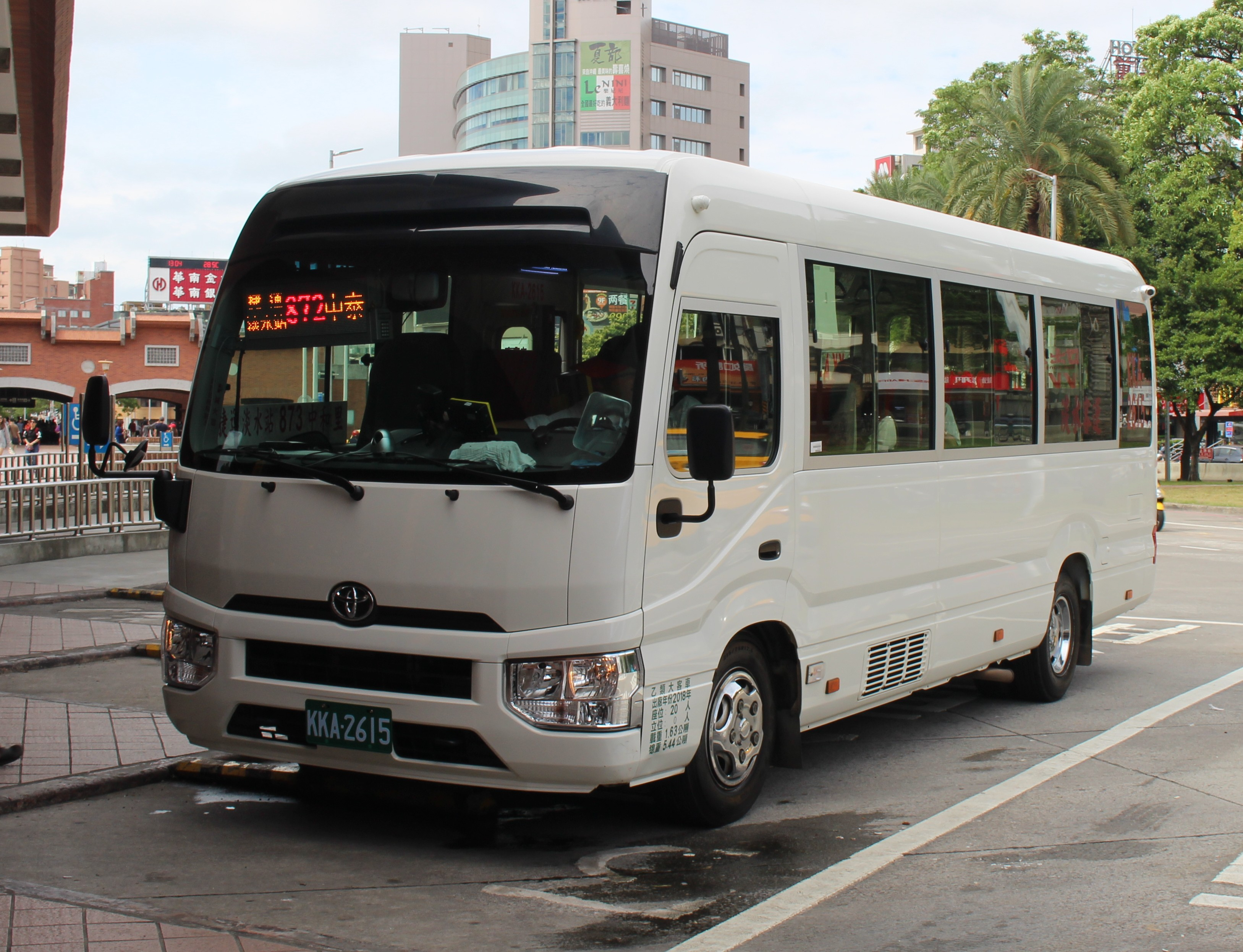 2018 Toyota Coaster XZB70L-ZEMSYR